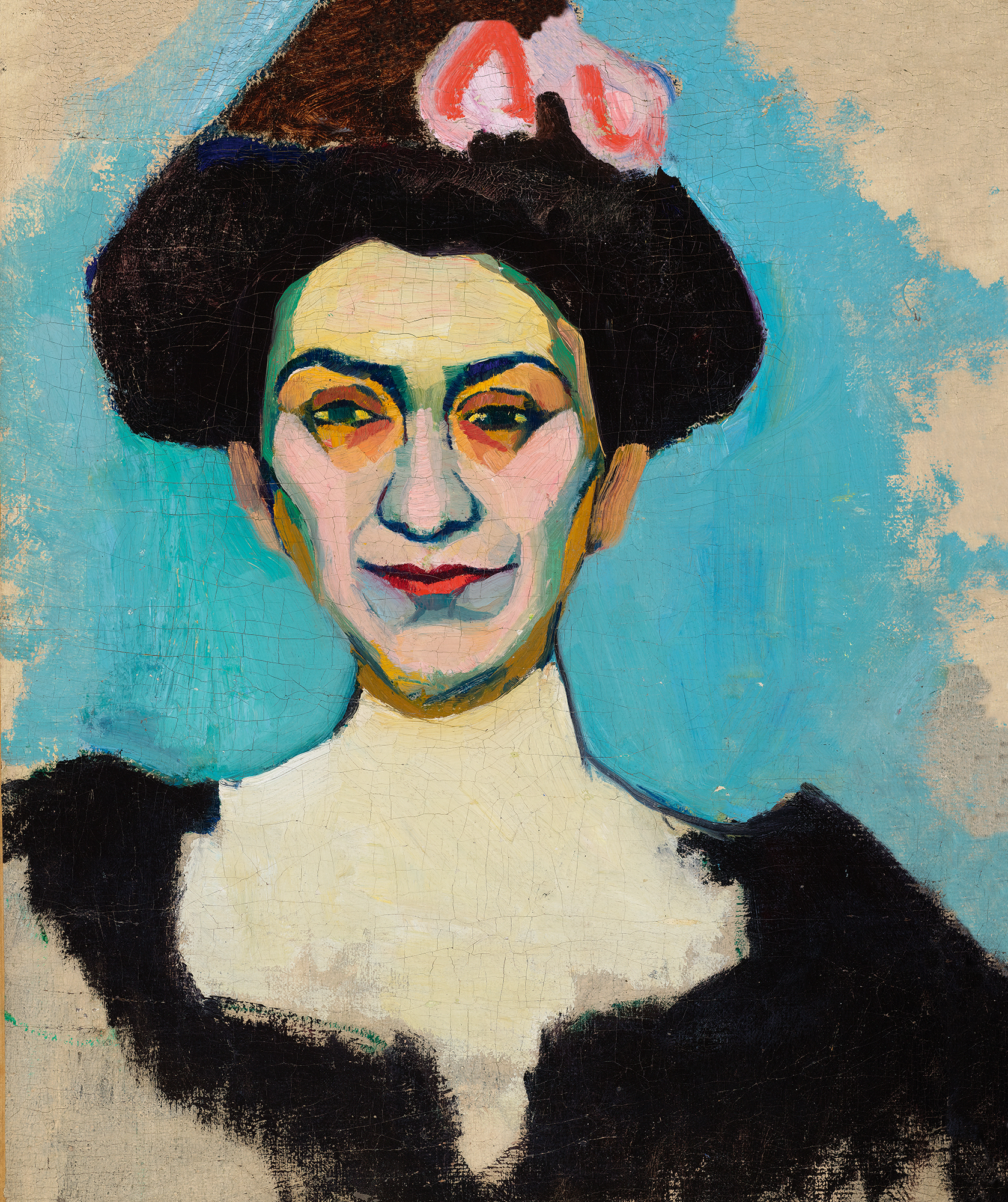 Портрет Л.Н. Вилькиной-Минской 1907 Холст на фанере, масло 55 × 46.1 cm